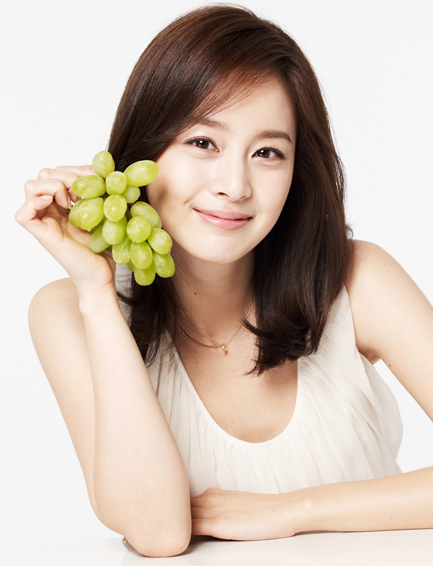 LG DIOS 정우성 & 김태희 광고사진.